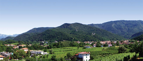 Panoramica di Faedis da Collevillano